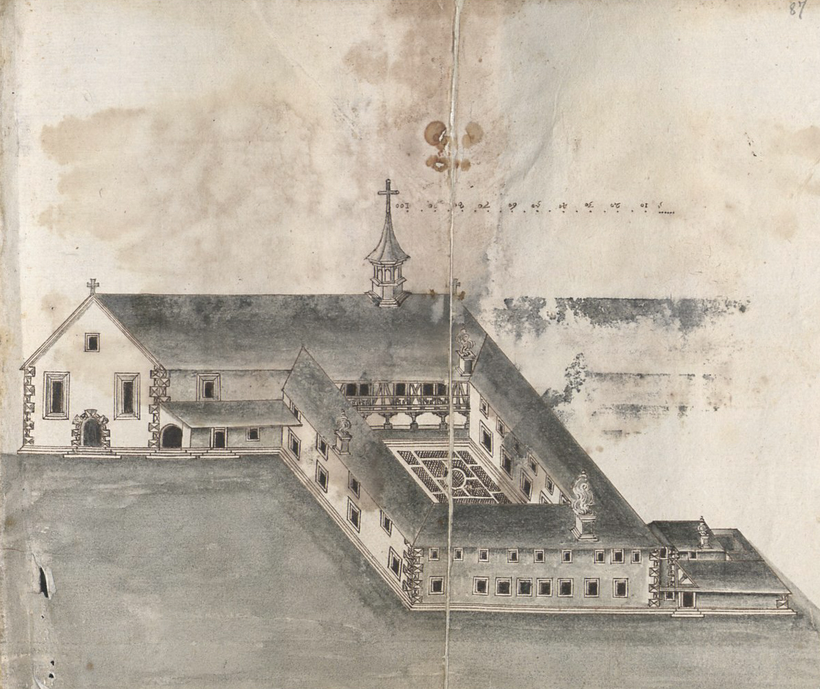 Architectura Capucinorum, Handschrift, 17. Jh., Württembergische Landesbibliothek, Cod. Don. 879, fol. 87r, (ausklappbare) Zeichnung eines Kaupzinerklosters